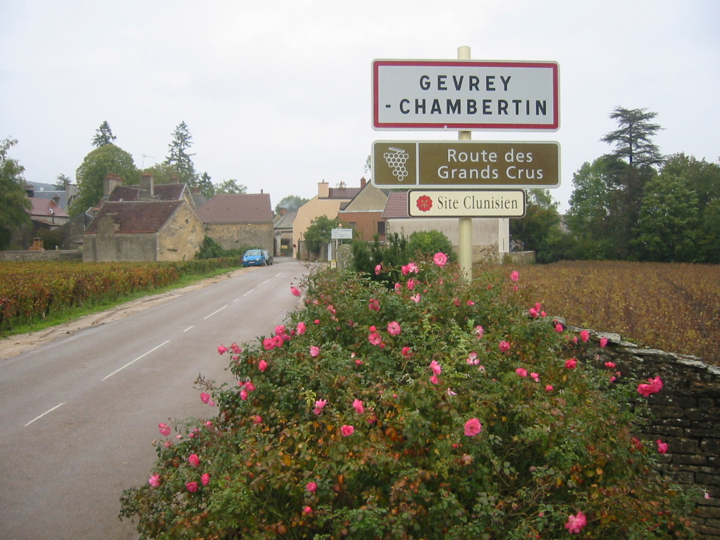 Panneau d'entrée de Gevrey Chambertin en Bourgogne